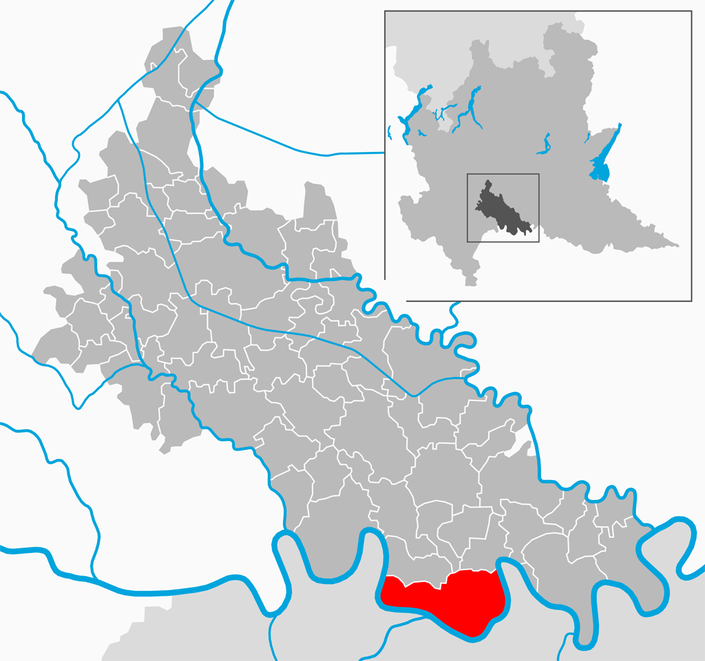 Il comune di San Rocco al Porto nella provincia di Lodi